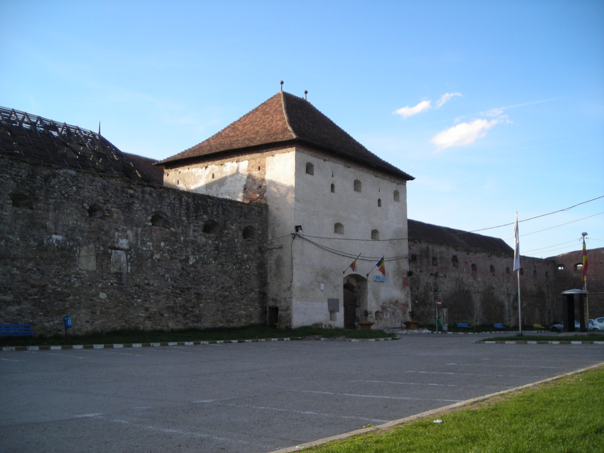 Cetatea Făgăraş - Entrada Principal